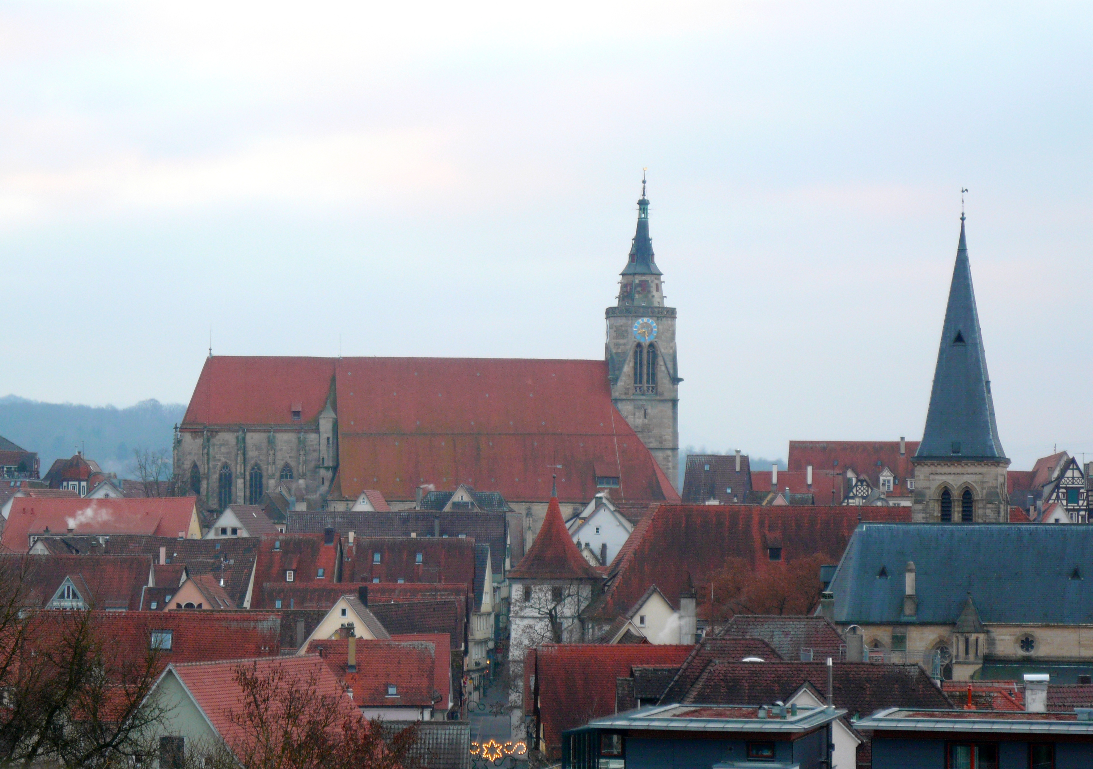 Stiftskirche in Tuebingen